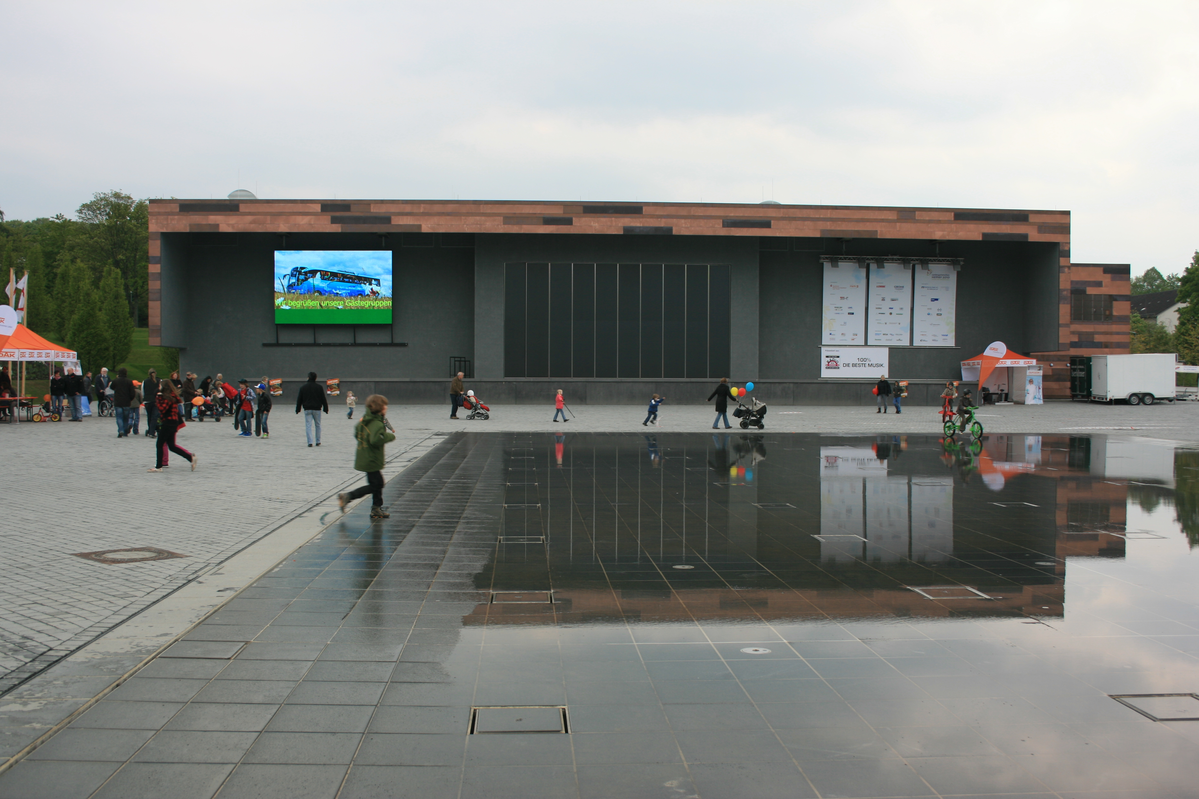 Himmelsspiegel und dahinter das Grohe-Forum, zentrale Teile des Gelaendes der Landesgartenschau 2010 in Hemer.